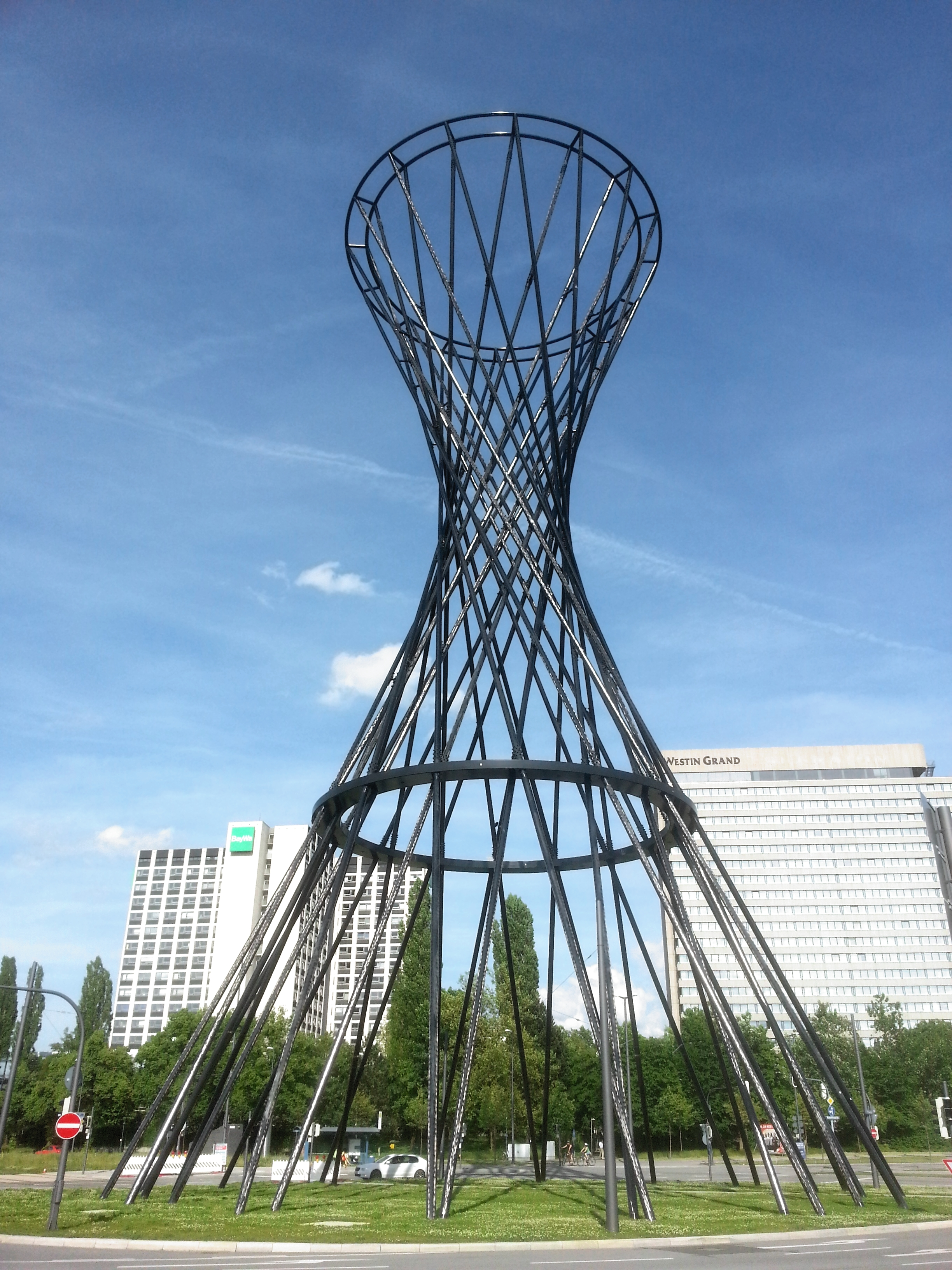 Die Mae West bei Sonnenschein